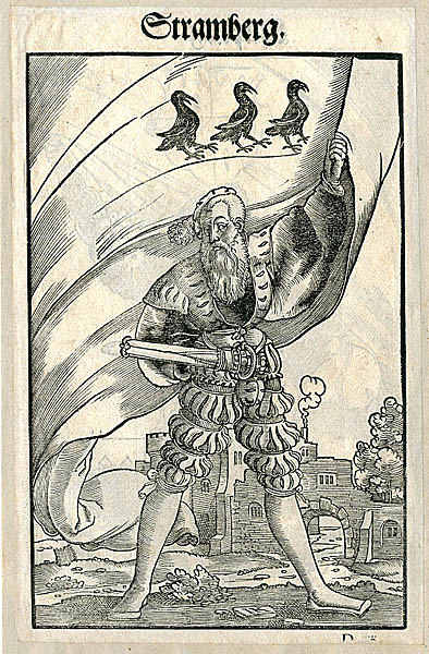 "Stramberg" (= Burggrafen von Stromberg), Landsknecht als Fahnenschwinger, Holzschnitt aus: Wapen des Heyligen Römischen Reichs Teutscher Nation, 1545; Jacob Kallenberg (IK) zugeschrieben (früher Jacob Köbel zugeschrieben)